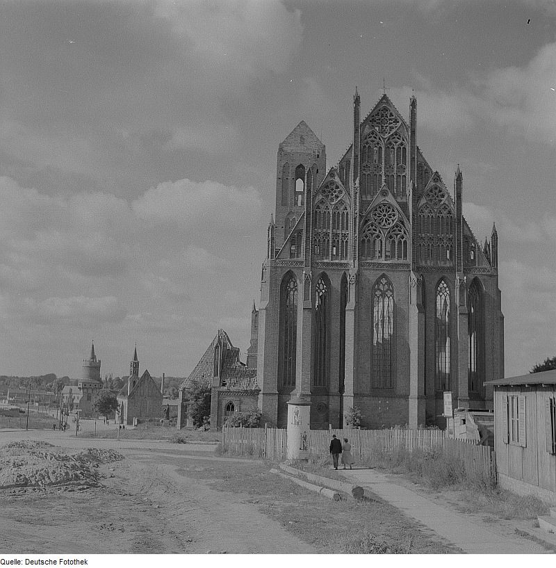 Original image description from the Deutsche Fotothek Prenzlau. Marienkirche, Chorfassade mit Schmuckgiebel an der Ostseite